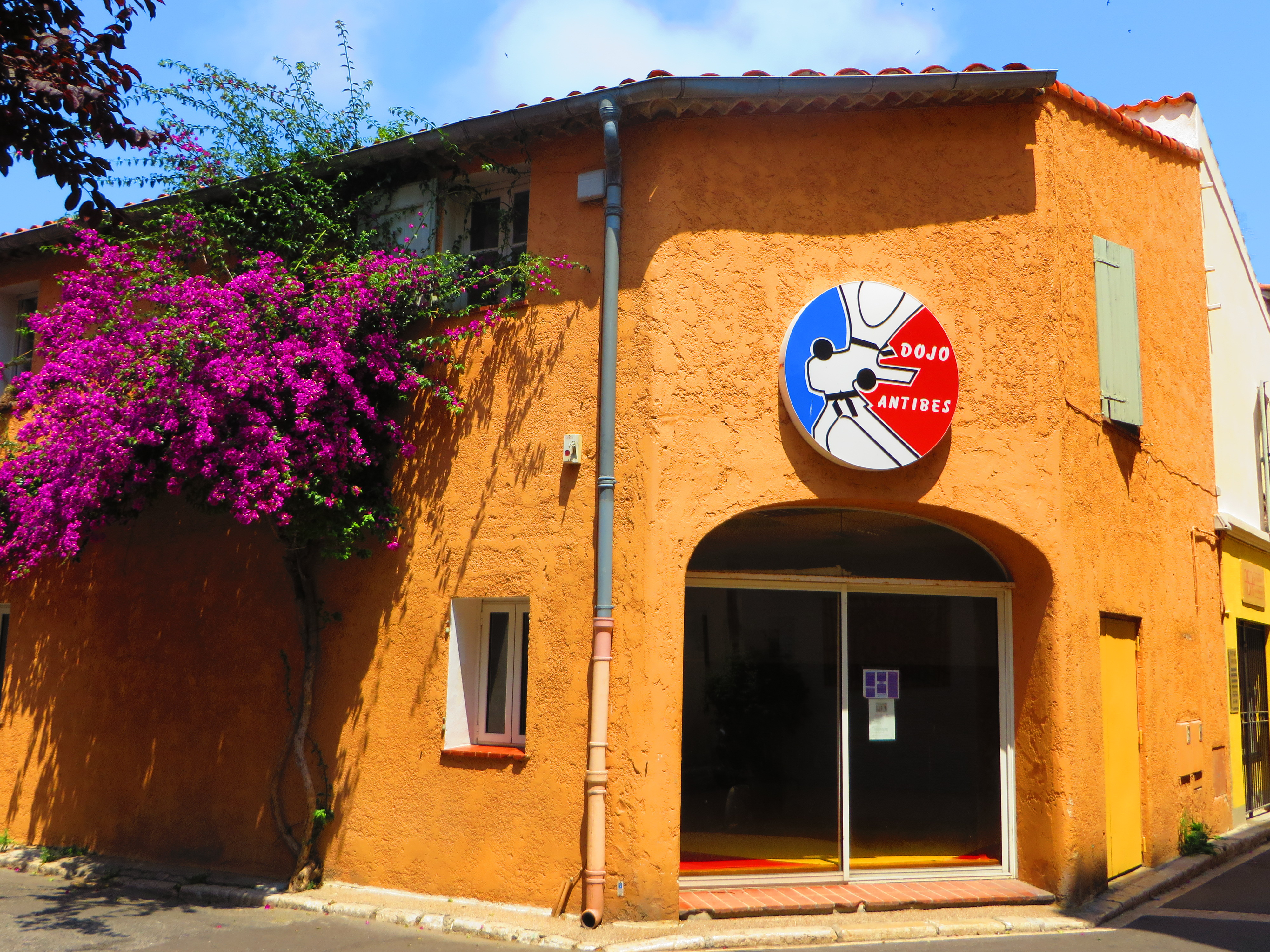 Antibes salle de dojo